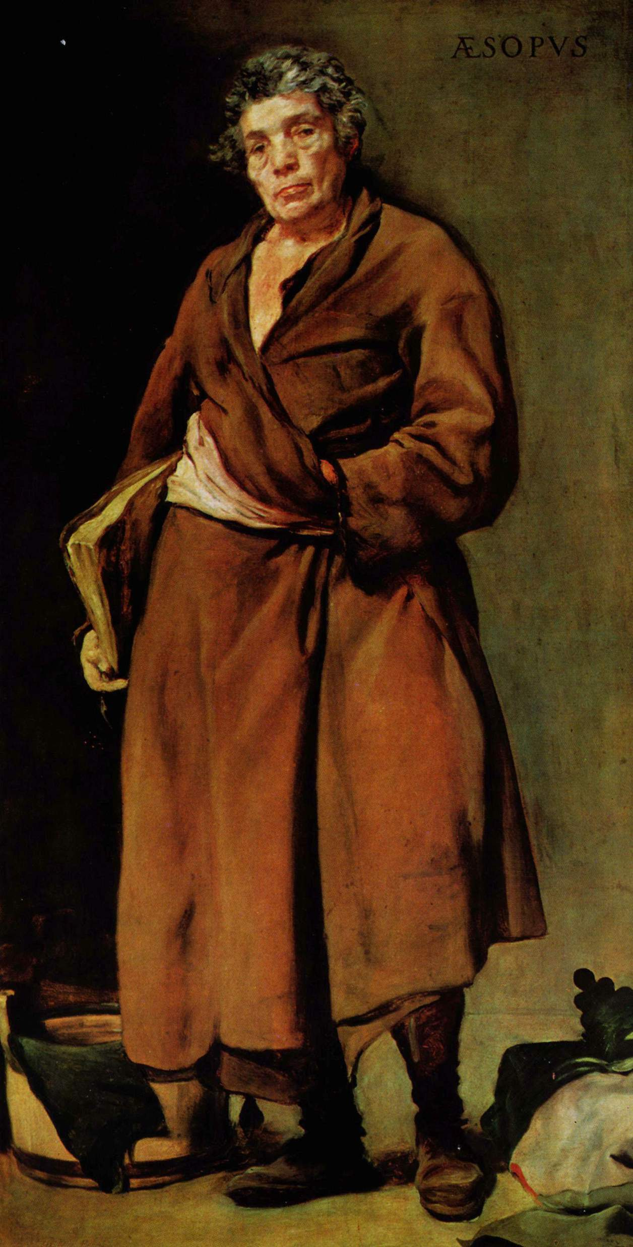 La obra representa al fabulista griego Esopo, y fue realizada por el pintor sevillano Diego Velázquez hacia el año 1638.